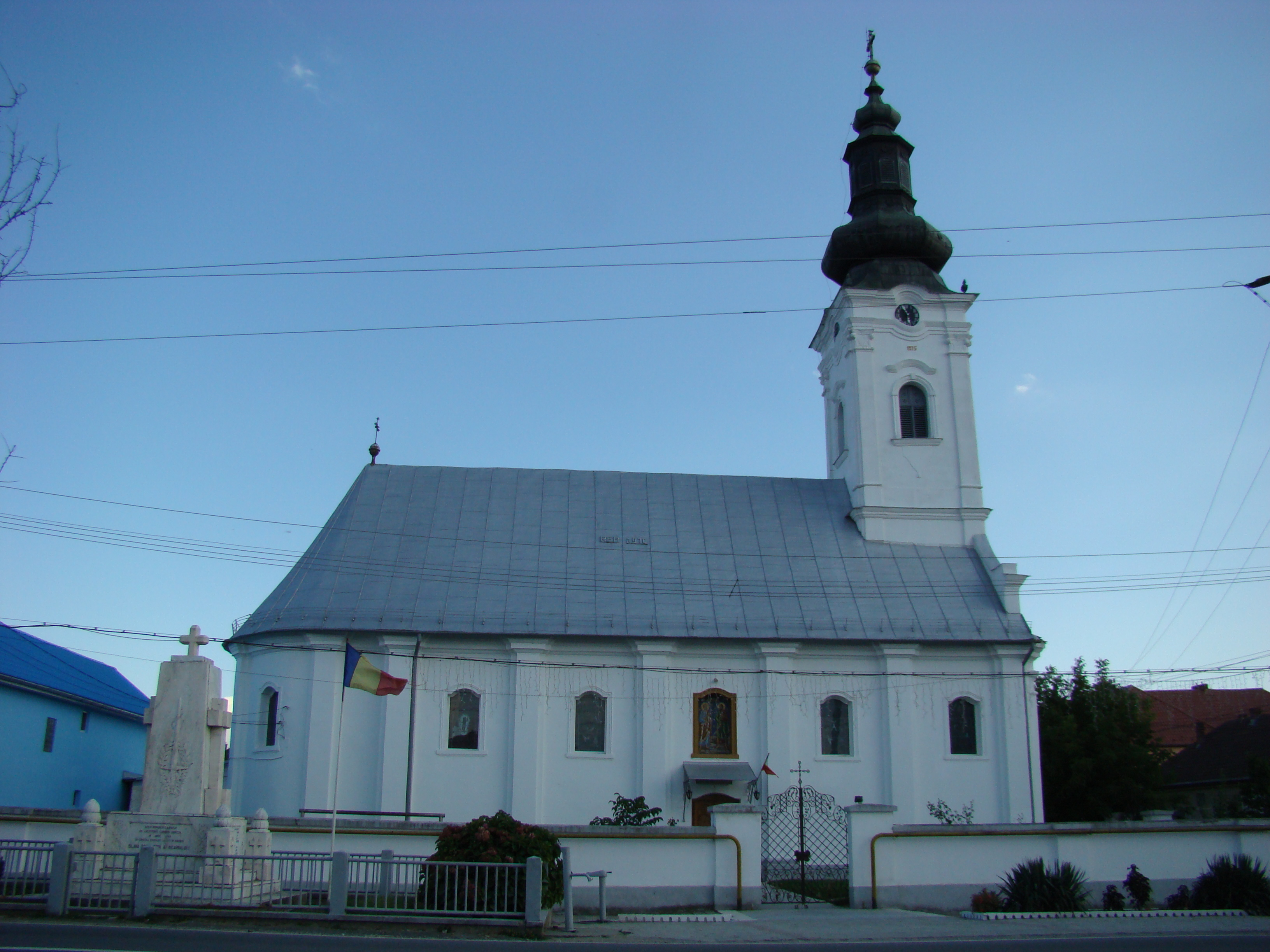 Biserica ortodoxă din Obreja, Caraș-Severin